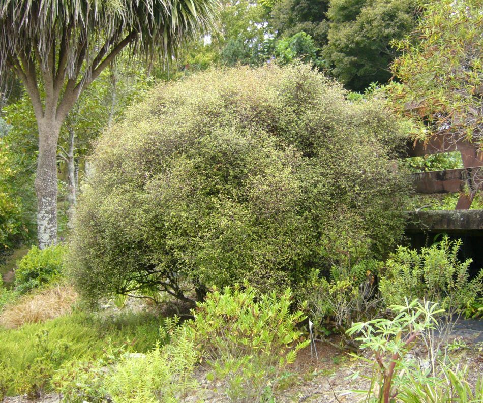 Muehlenbeckia astonii